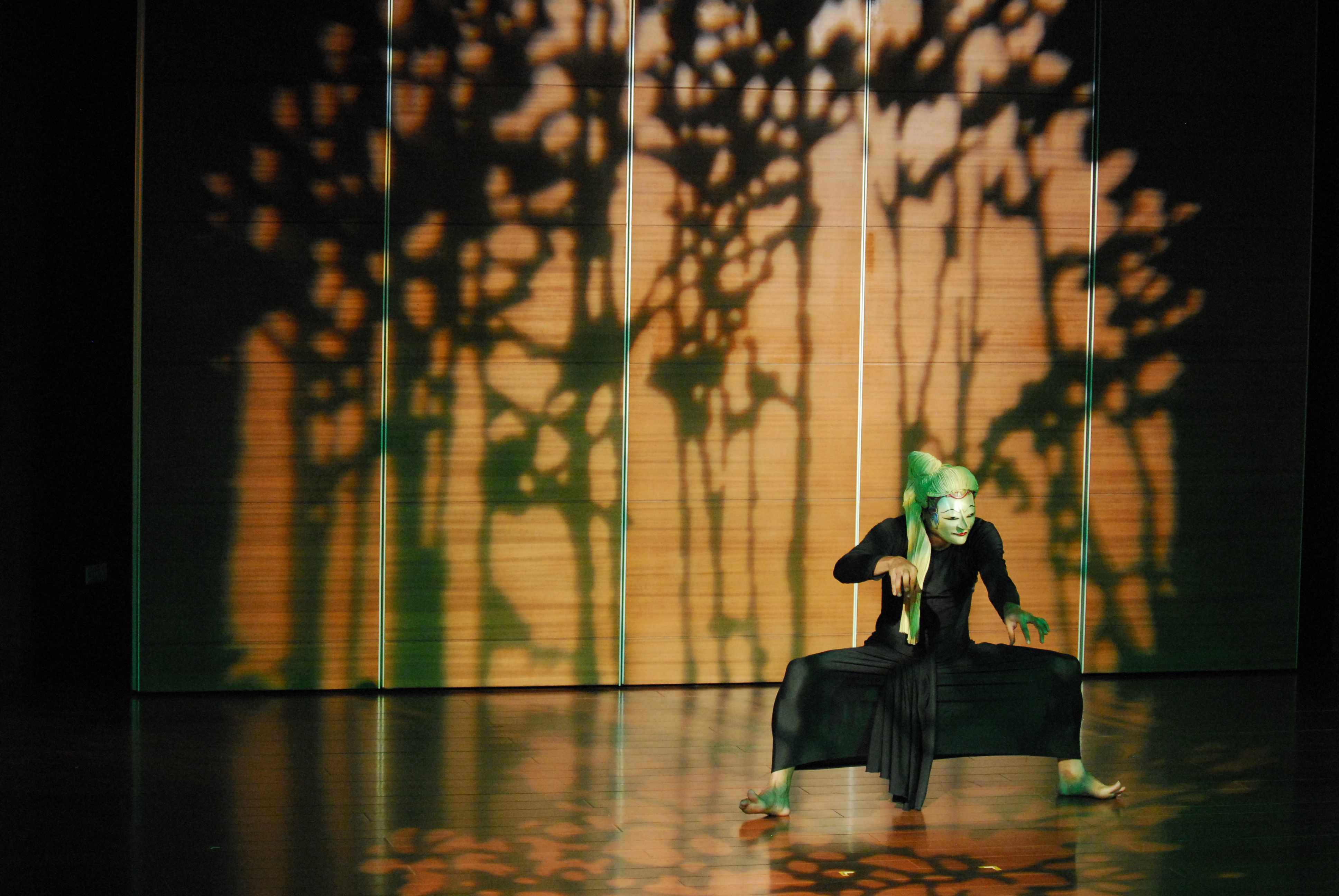 Miroto (Martinus Miroto) dikenal sebagai penari dengan 5 topeng